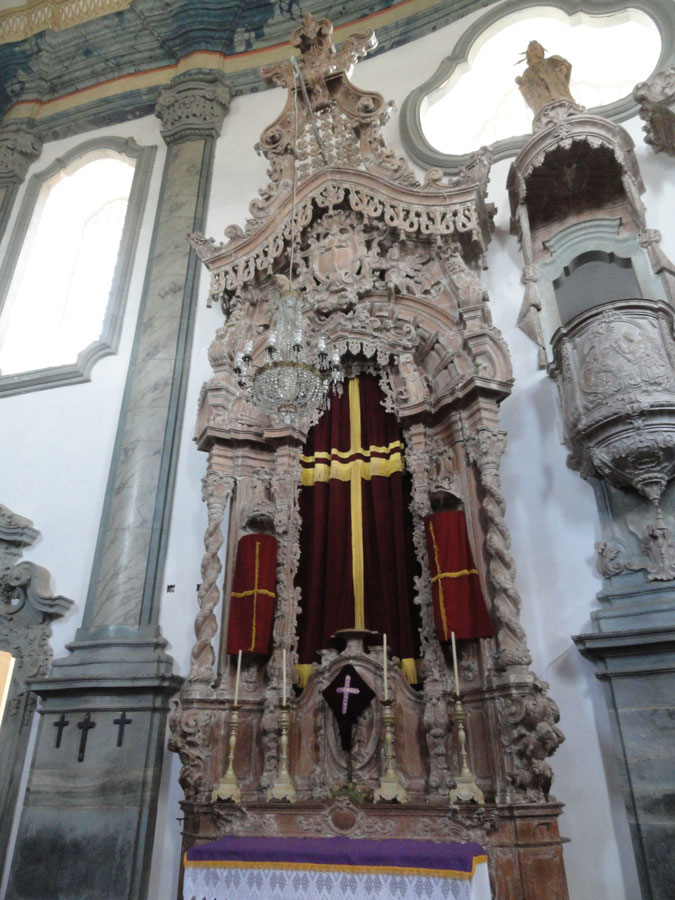 Igreja de São Francisco de Assis (São João del-Rei)